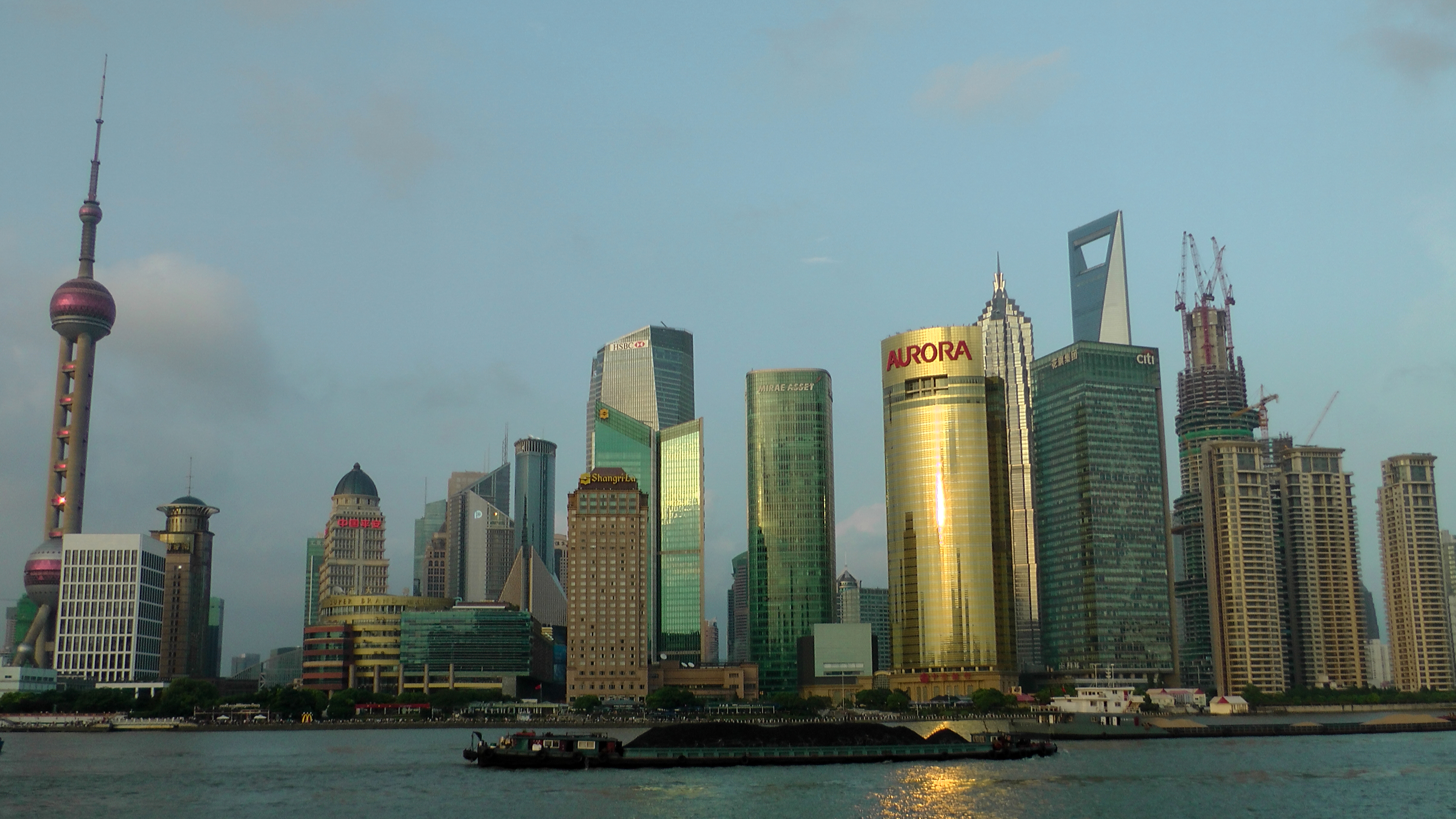 Le quartier de Lujiazui à Shanghai, vu depuis le Bund.